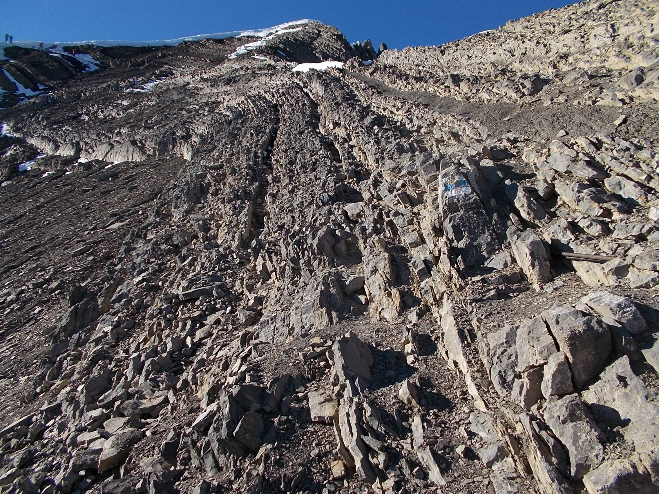 Gesteinsschichtungen am Südanstieg kurz unterm Gipfel. Links oben erkennt man die Grenztafel auf dem Sattel zwischen Südschulter und Hauptgipfel.